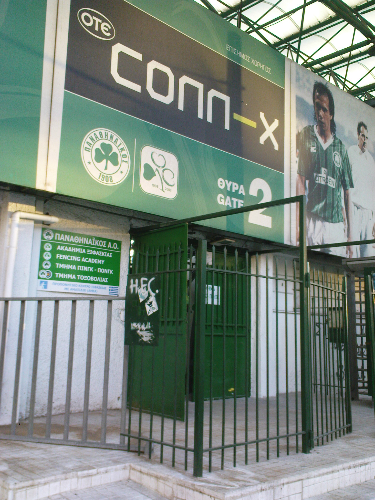 Η είσοδος για τα γυμναστήρια ξιφασκίας, πινγκ πονγκ και τοξοβολίας στη θύρα 2 του γηπέδου της Λεωφόου Αλεξάνδρας